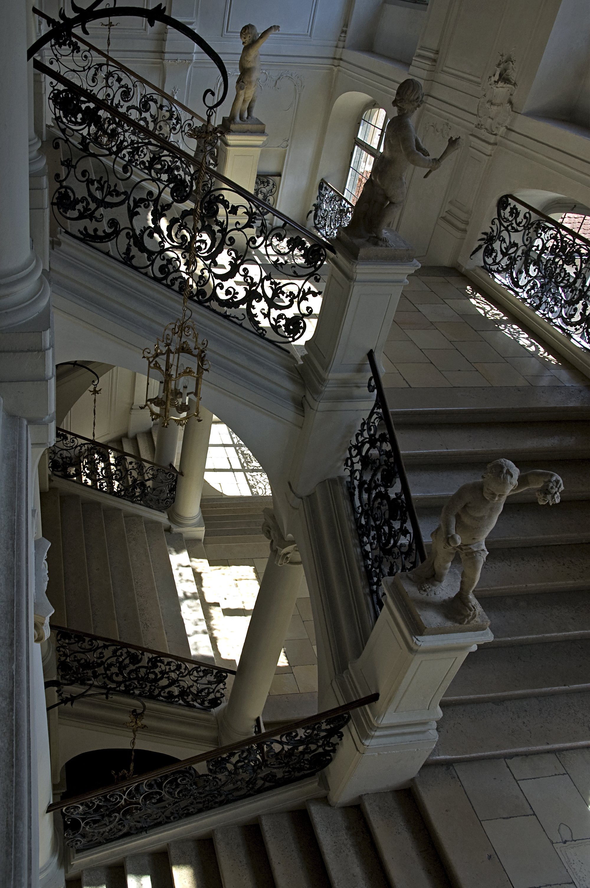 Residenz Eichstätt Die Residenz Eichstätt, der ehemalige Sitz der Eichstätter Fürstbischöfe am Residenzplatz in Eichstätt. Barockes Treppenhaus von Maurizio Pedetti (* 13. Oktober 1719, † 14. März 1799 in Eichstätt)This is a photograph of an architectural monument.